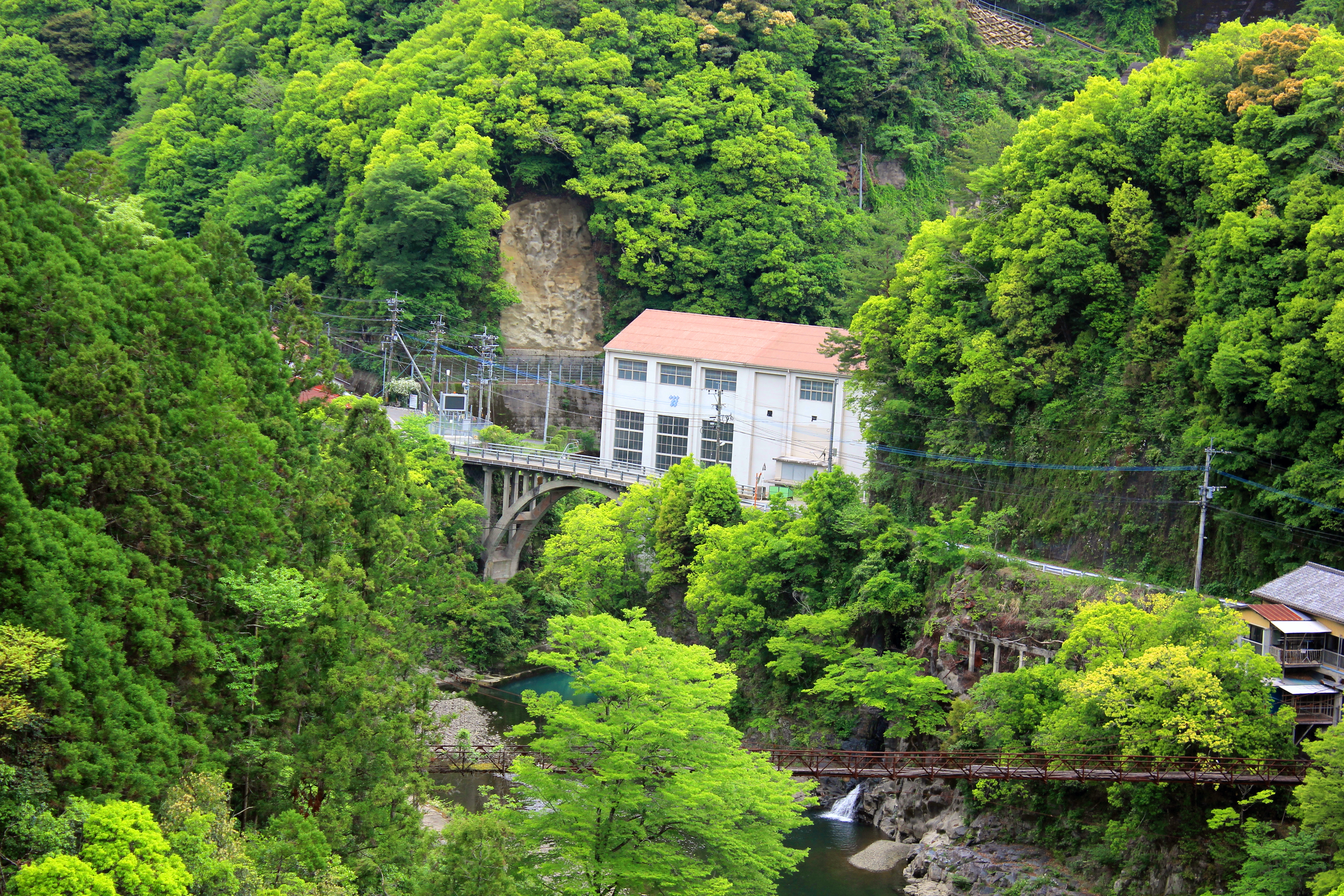 岩屋戸発電所（宮崎県・耳川。九州電力株式会社管理）